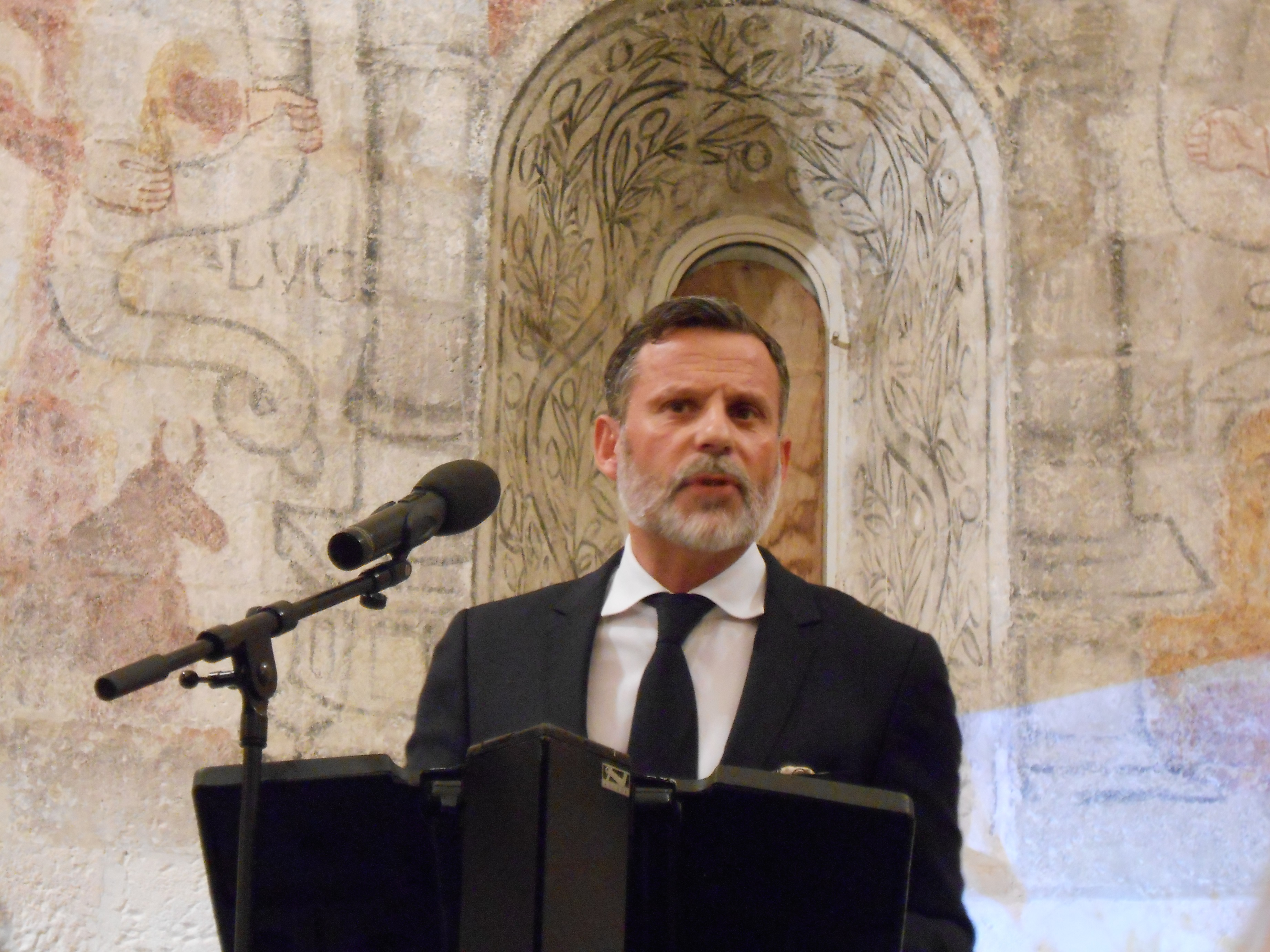 25 11 2016 à Rochefort du Gard, il annonce sa candidature à un second mandat de député